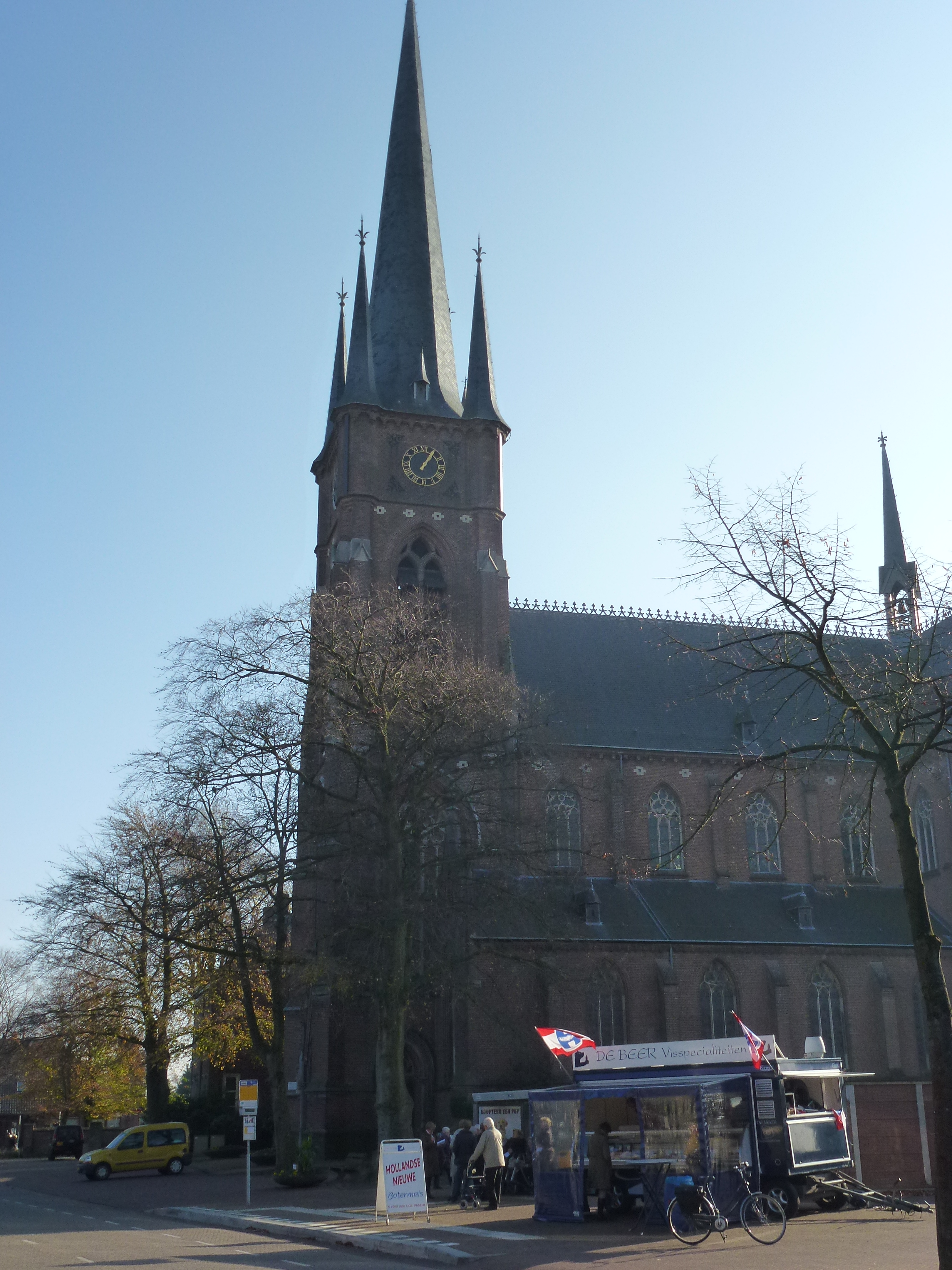 St Trudo Stiphout Monument 21456